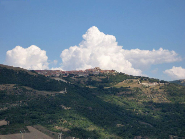 Scorcio di Montaguto